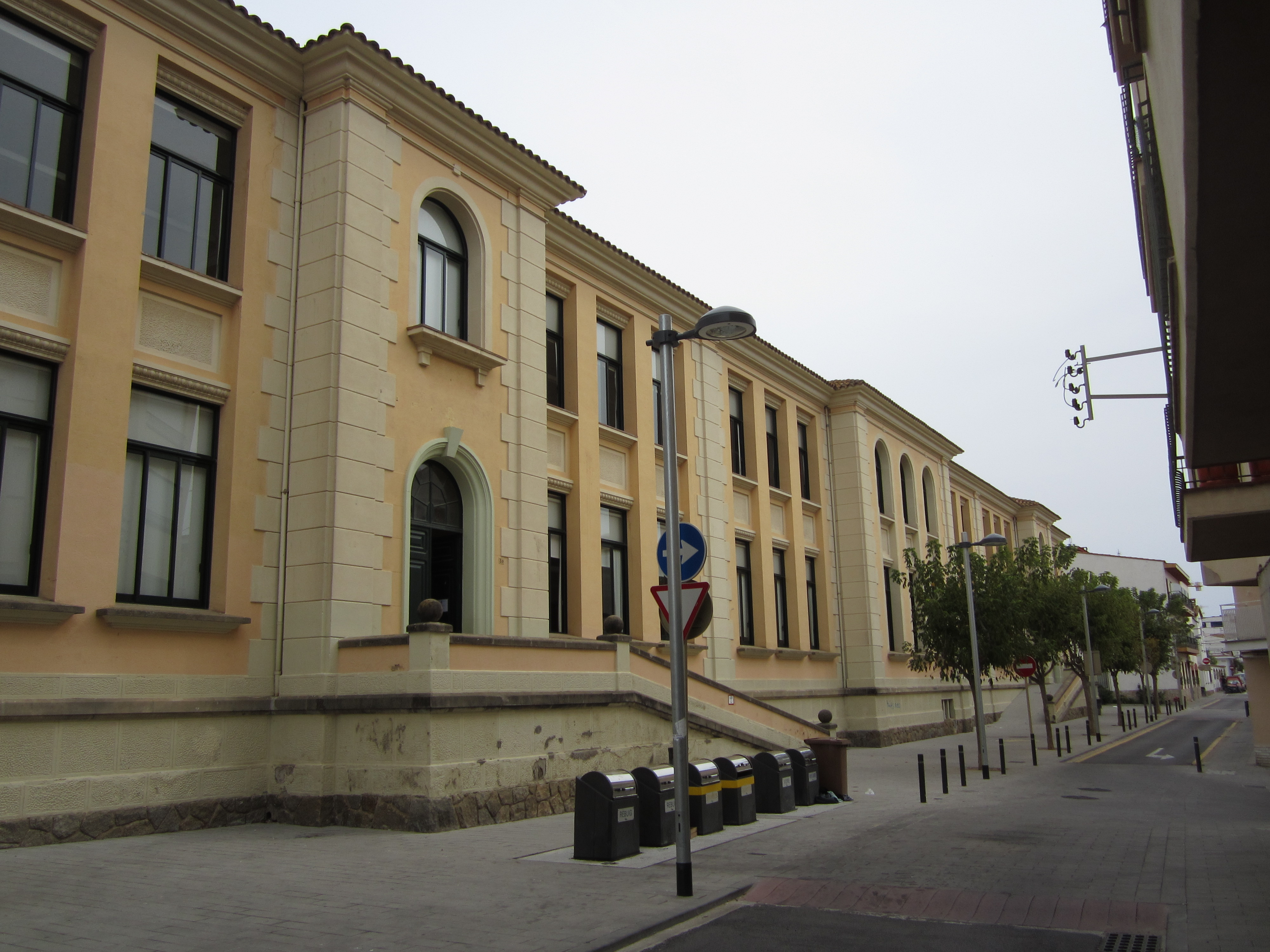 Escoles Municipals (Palamós)